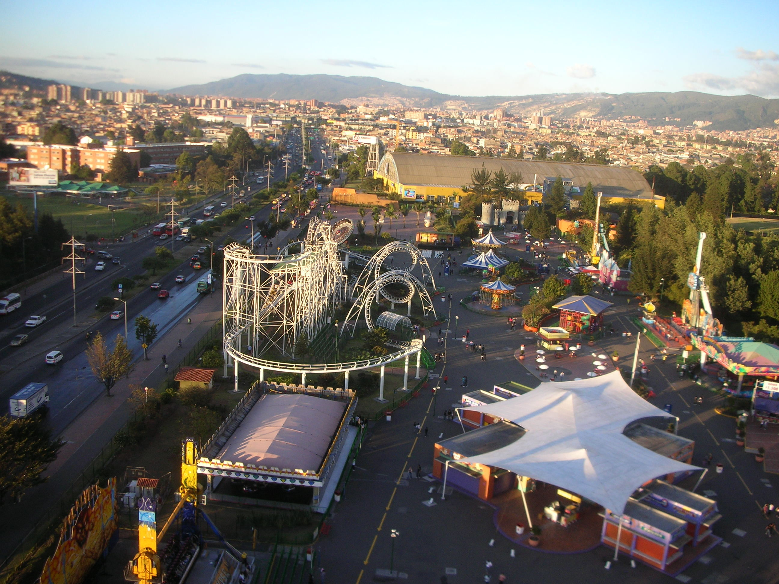 Esta fotografía fue tomada en el municipio colombiano con código 11001.